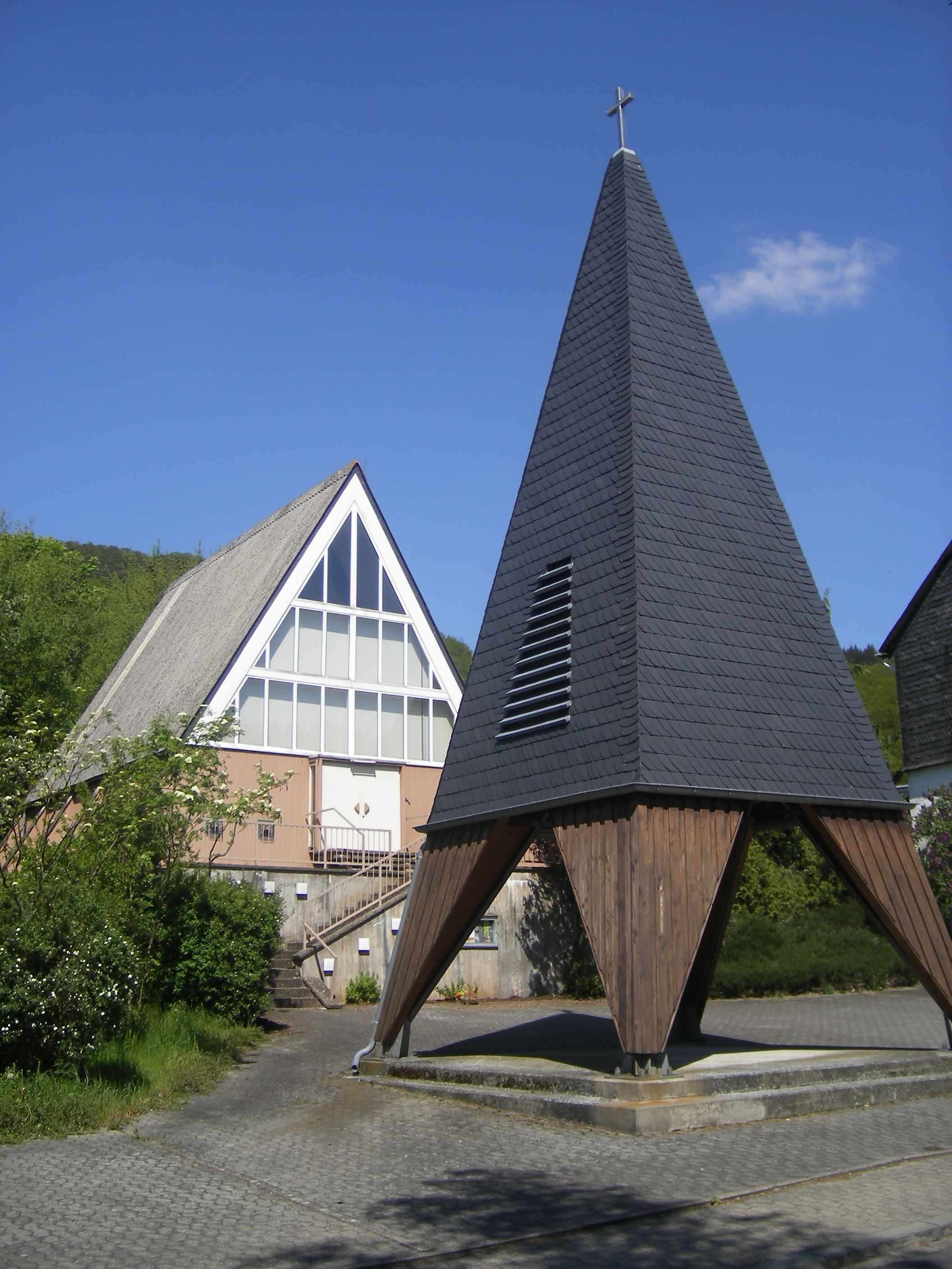 Protestant church, Heimweiler, Rhineland-Palatinate